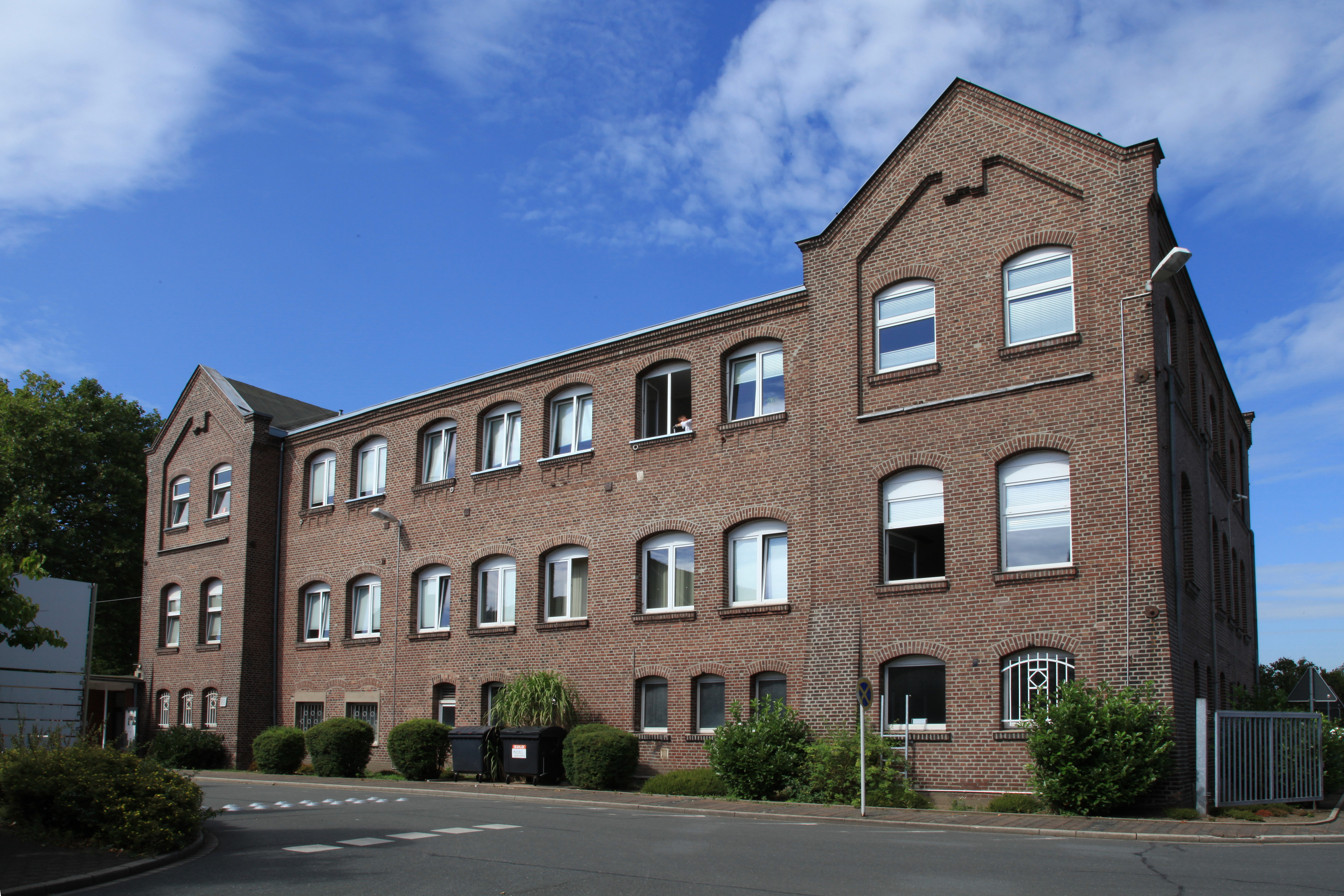 Verbliebene Gebäude der Zeche Rheinbaben, jetzt in Benutzung und auf dem Firmengelände von Eurovia Teerbau GmbH NL Bottrop, Rheinbabenstraße 75 in Bottrop. Die Aufnahmen auf dem eigentlich nicht zugänglichen Firmengelände entstanden mit freundlicher Genehmigung der Eurovia Teerbau GmbH.